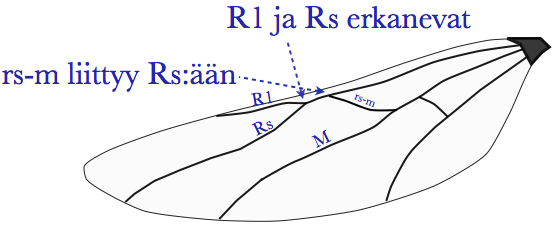 Yksinkertaistettu piirros vainopistiäisen (Braconidae) takasiivestä. Kuvaan on lisätty tekstiä joka selventää miten ahmaspistiäiset (Ichneumonidae) erottaa vainopistiäisistä (Braconidae). Siipisuonet on nimetty Gauldin mukaisesti (The Ichneumonidae of Costa Rica; 1991).